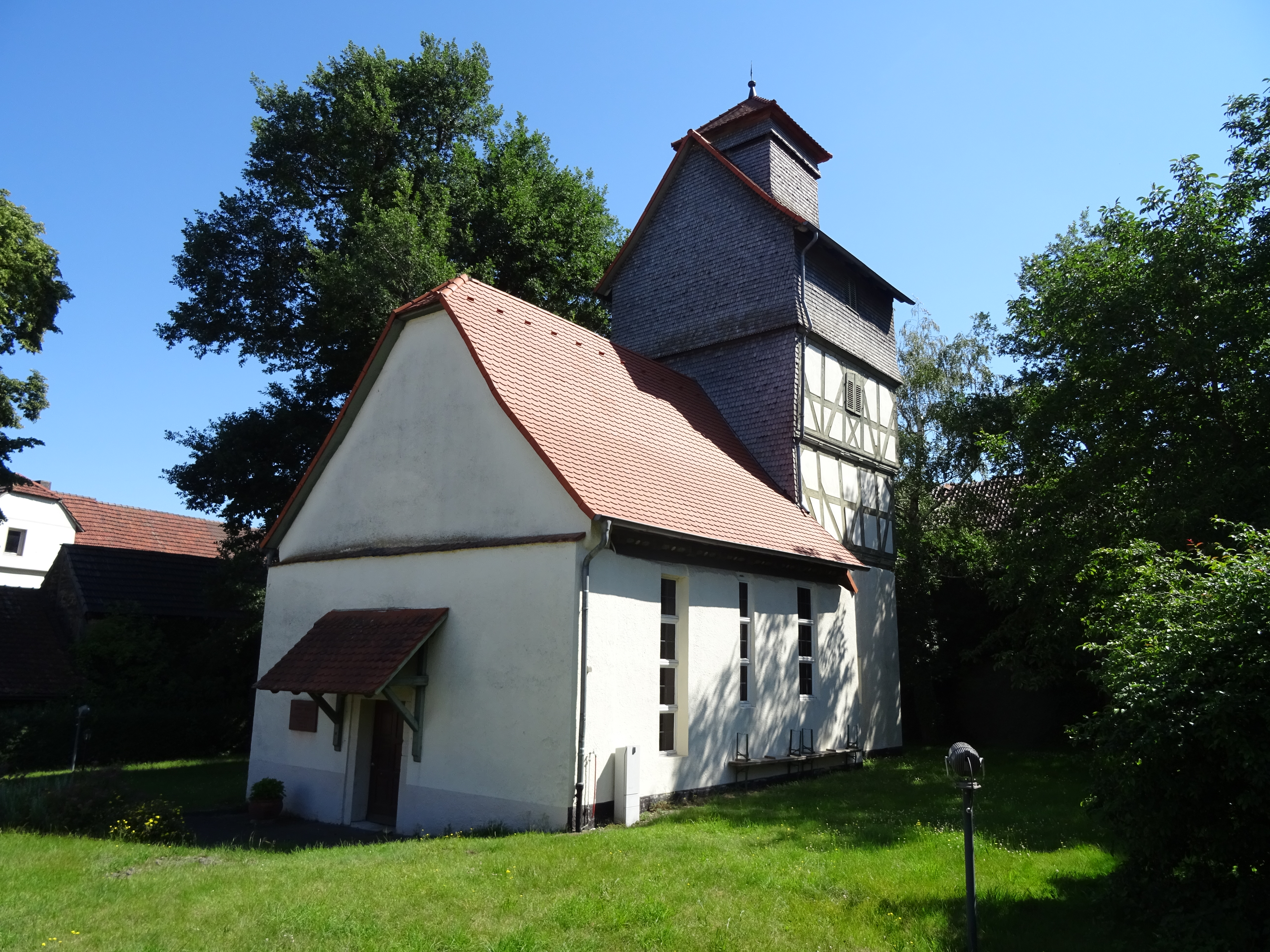 Außenansicht